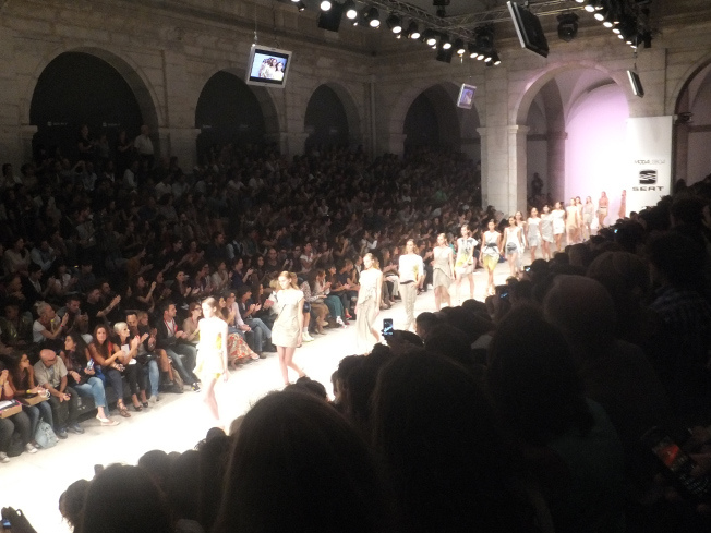 Pátio da Galé, Lisbon • 07.10.2011 Photo: Sara Alves Corceiro